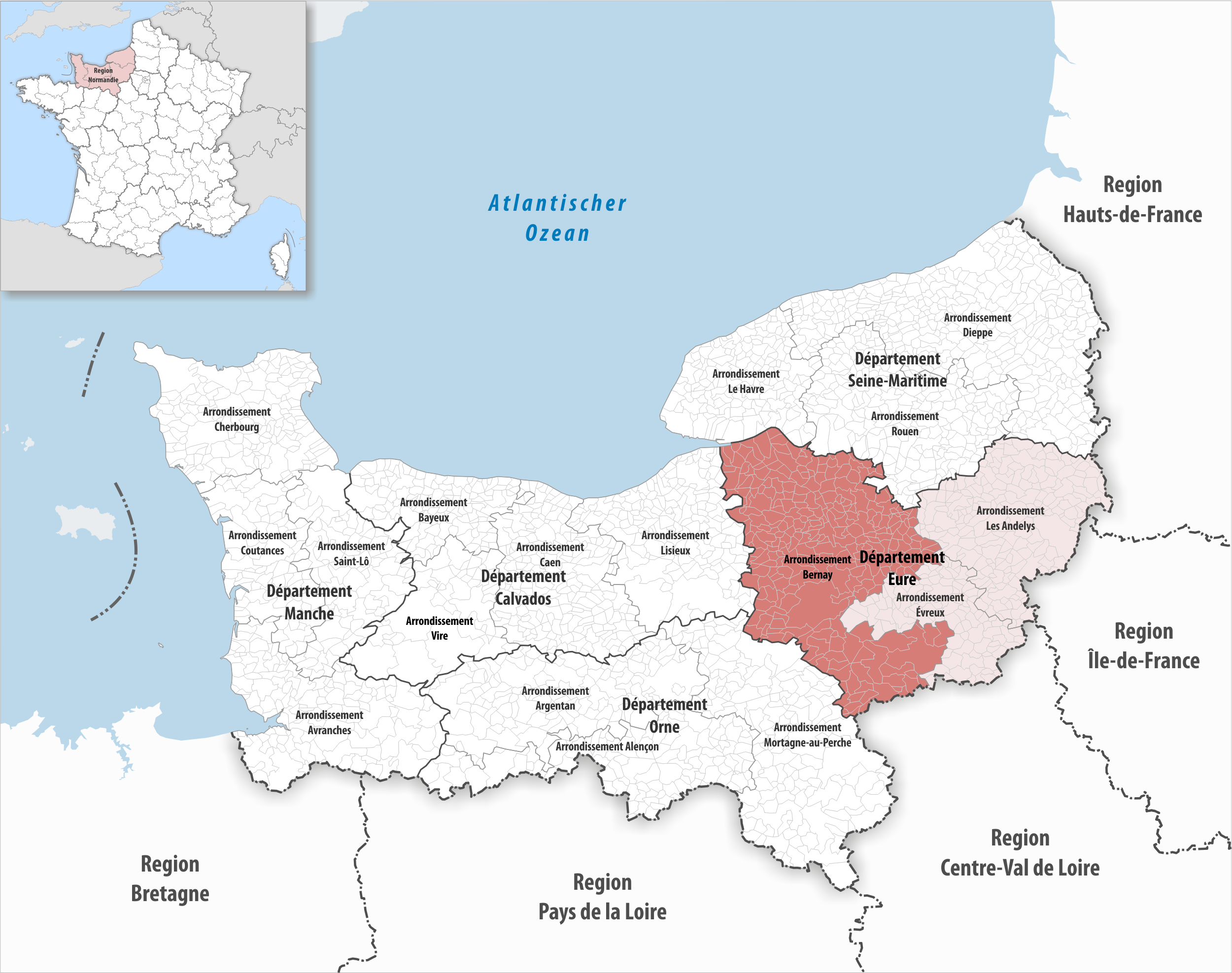 Lage des Arrondissements Bernay